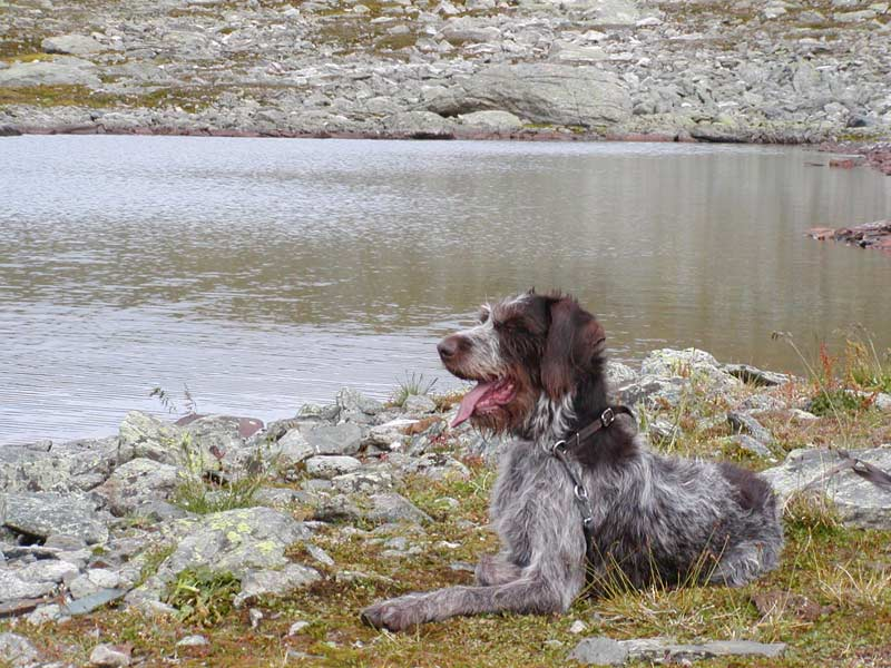 Bildet viser strihåret vorsteh som er med ute på tur.